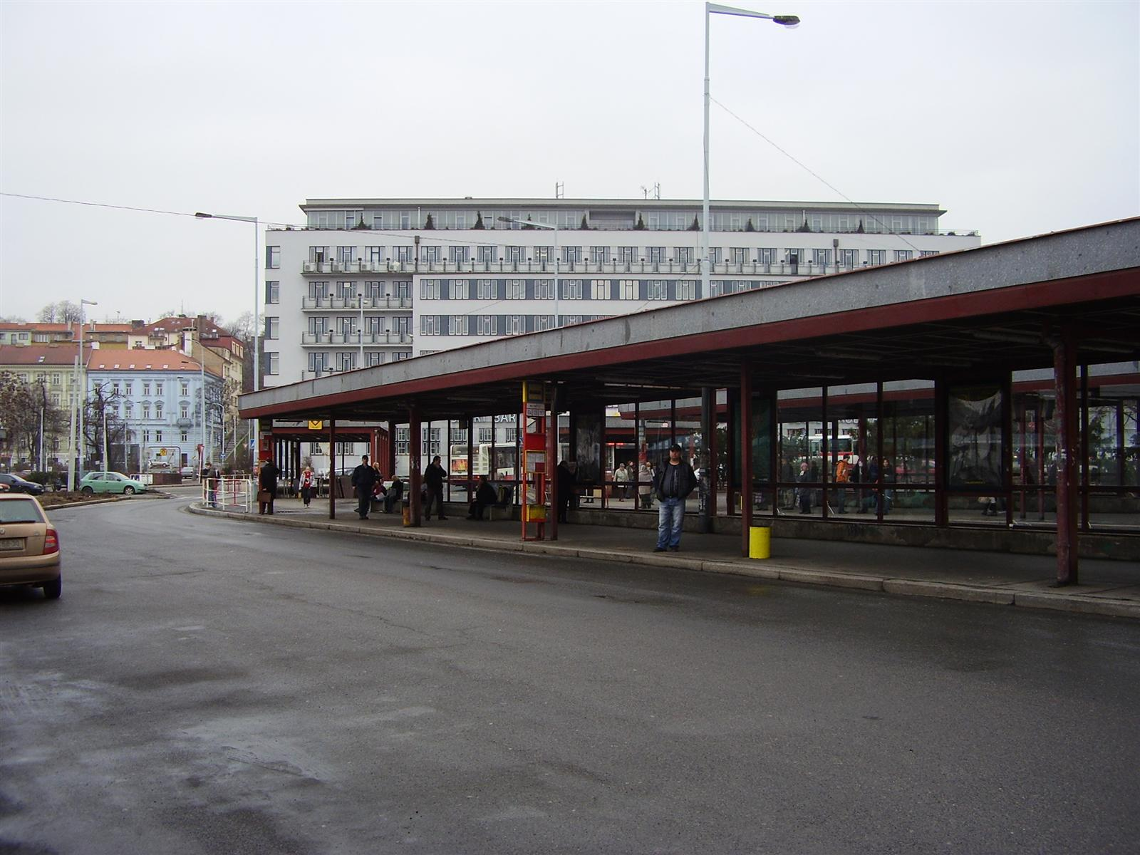 Nástupiště na AN Na Knížecí v Praze.